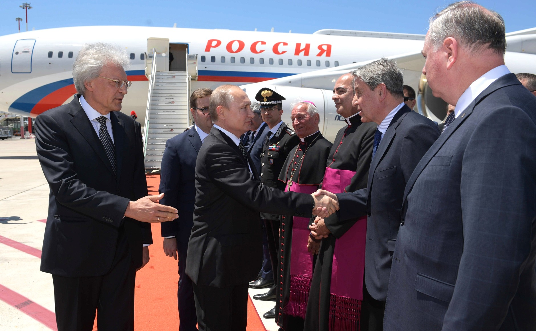 Президент России Владимир Путин прибыл с официальным визитом в Италию